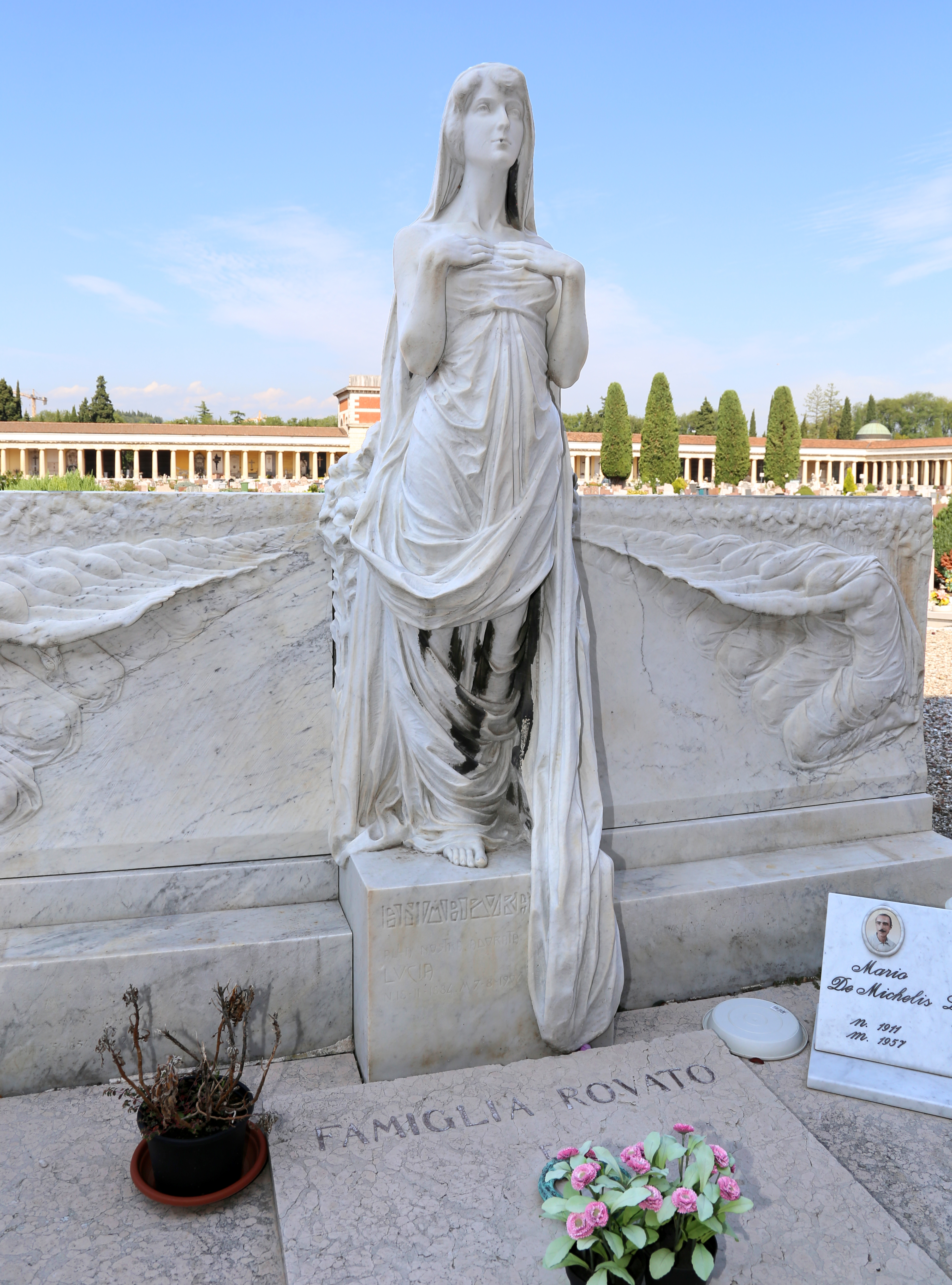 cimitero monumentale di Verona This is a photo of a monument which is part of cultural heritage of Italy.